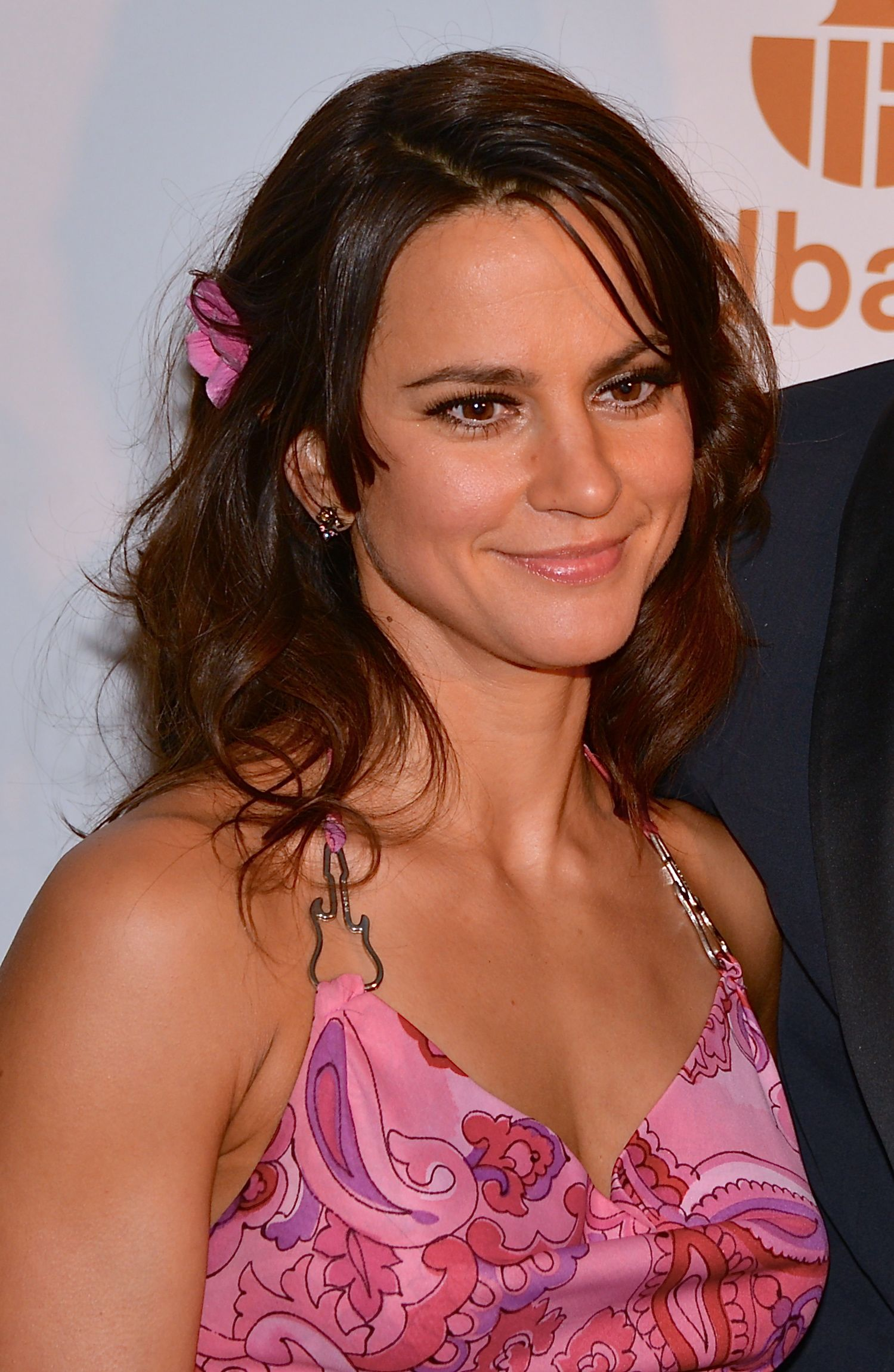 Melinda Kinnaman på Guldbaggegalan 21 januari 2013.